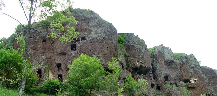 Vue du site des grottes troglodytique de Jonas en Auvergne(France)